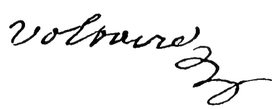 Unterschrift von Voltaire aus dem Werk /Signature of Voltaire/Signature de Voltaire